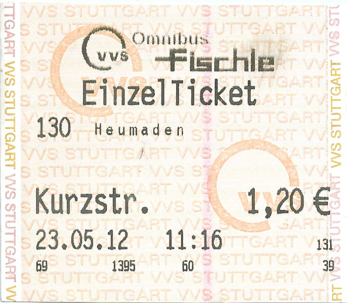 Einzelticket Erwachsener VVS Preisstufe Kurzstrecke, ausgegeben durch Omnibus Fischle